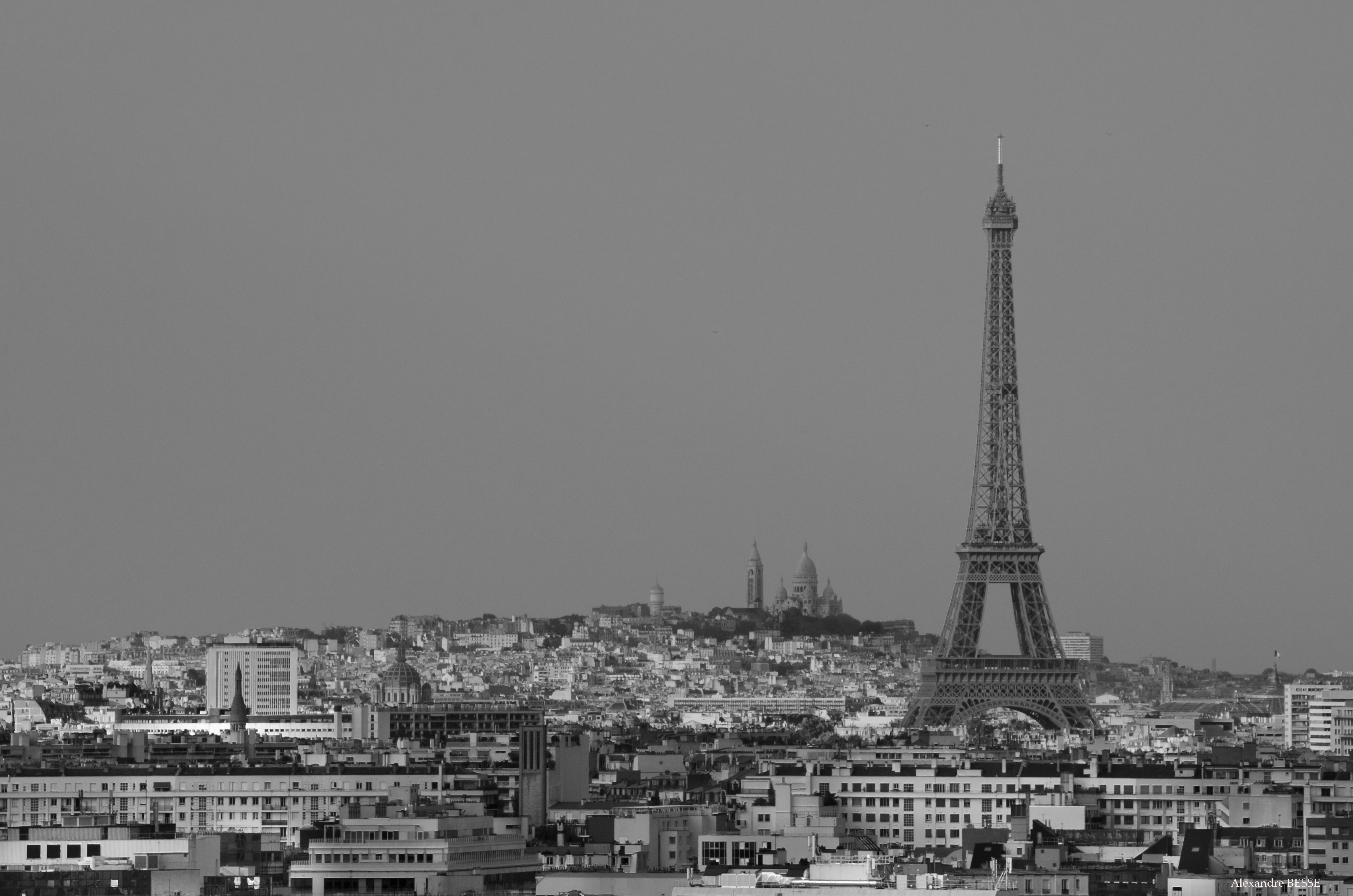 Tour Eiffel et Montmartre vus de Meudon.